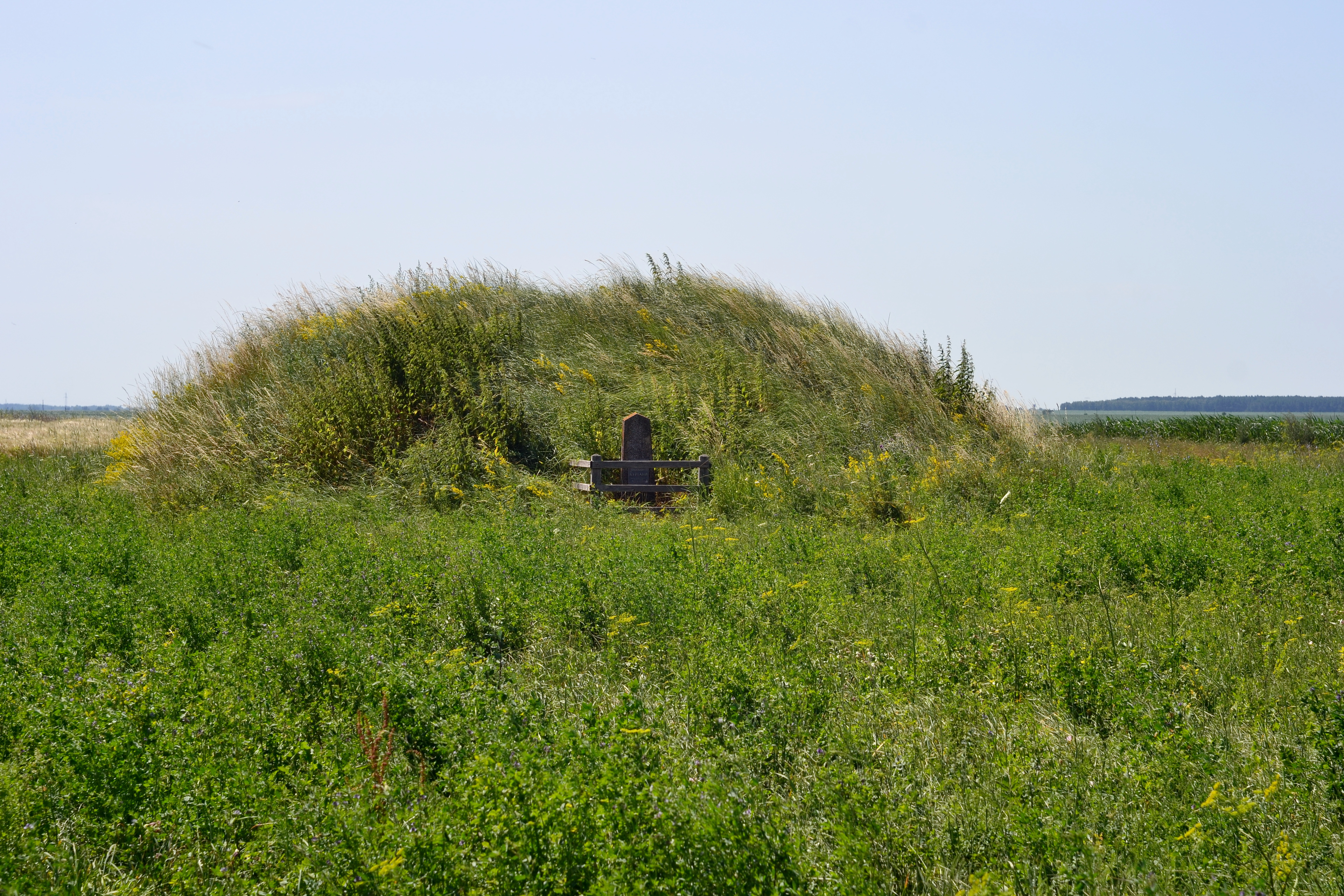 Курган (X—XIII ст.) - вигляд з півночі - Радошин (за 0,3 км на південь від села, біля дороги) Ковельський район Волинська область Україна